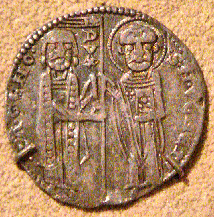 Silver Grosso of Doge Raniero Zeno, 1253-1268, Venice